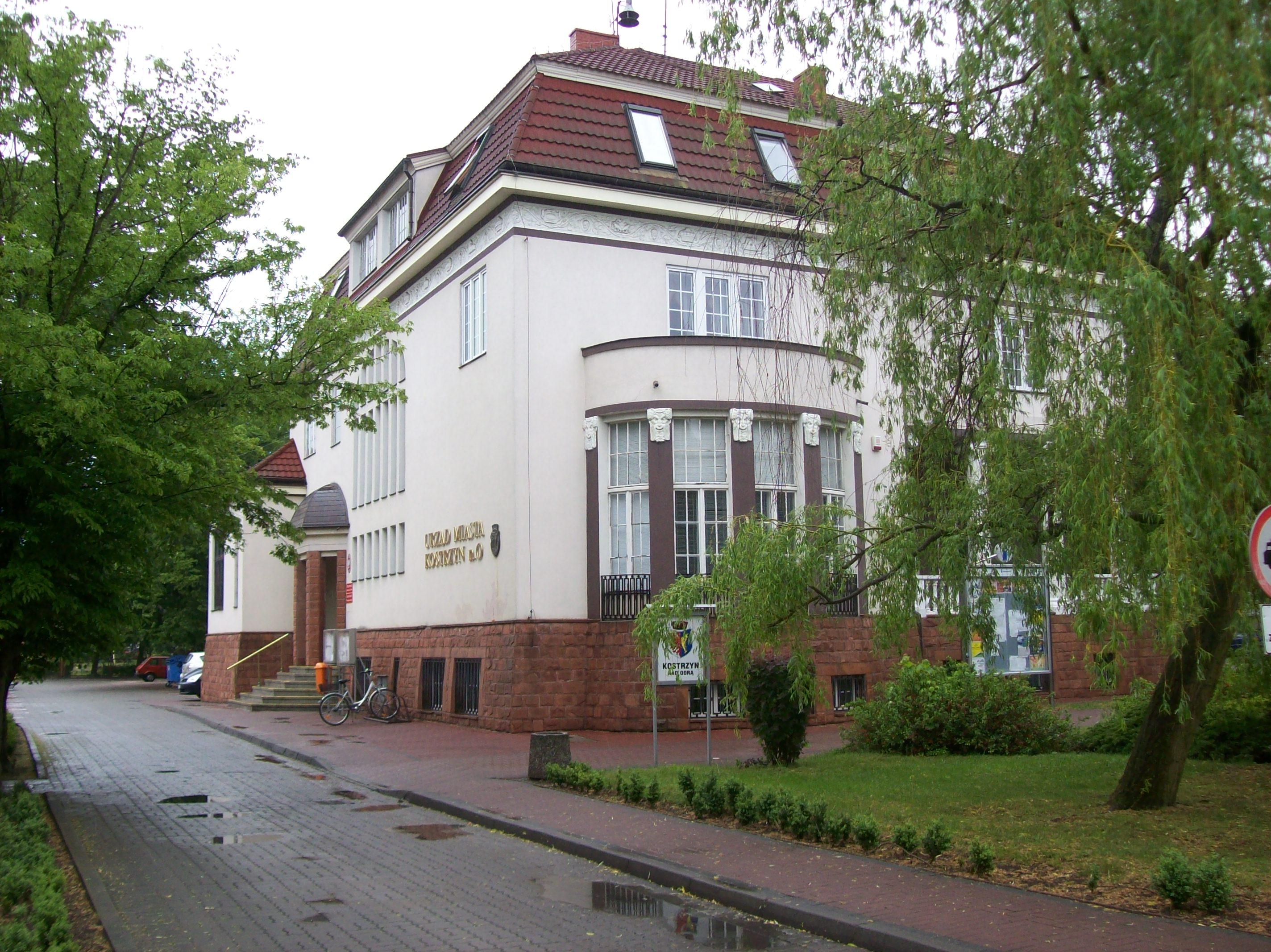 Budynek Urzędu Miasta w Kostrzynie n/O.